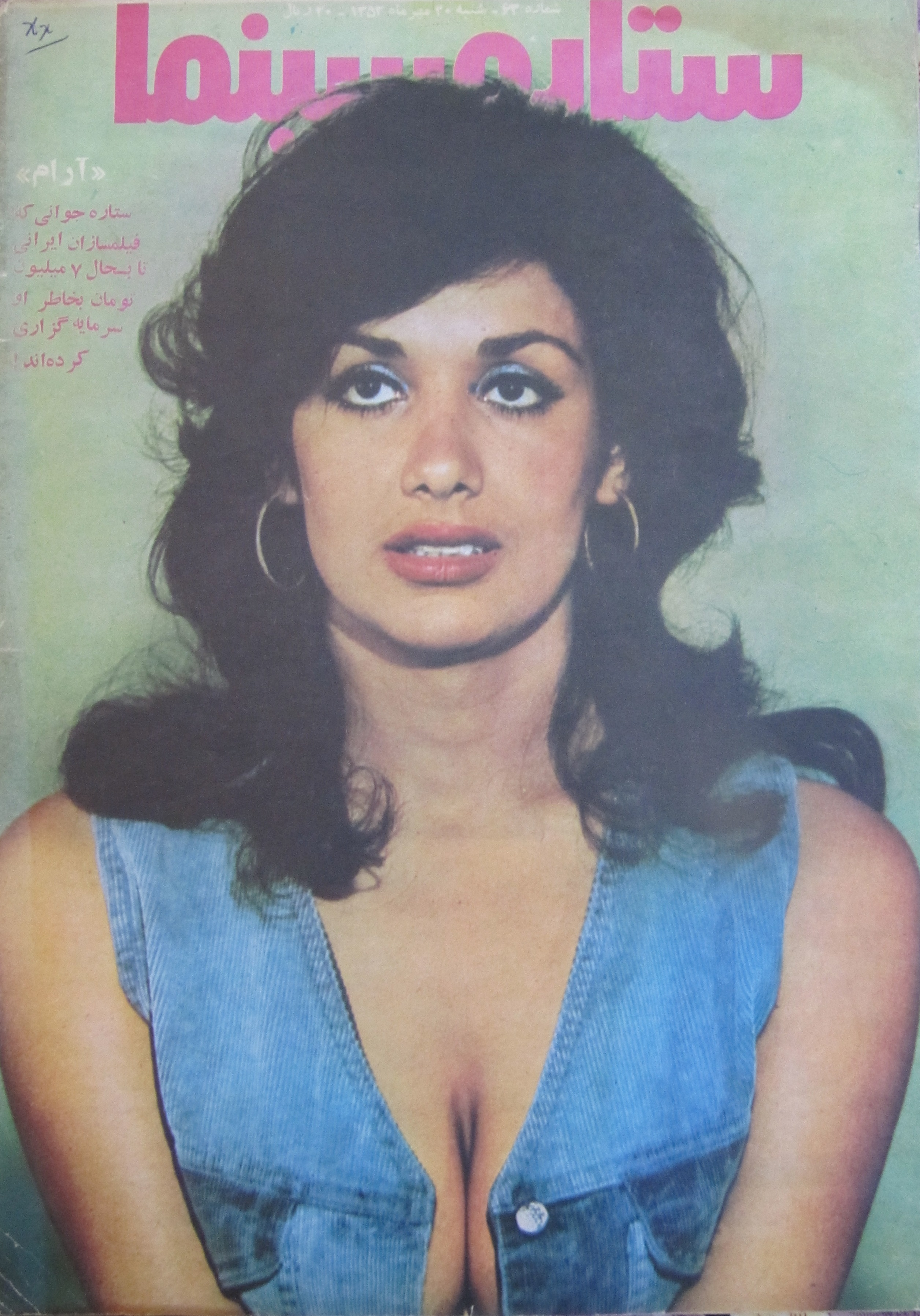 آرام،‌ روی جلد مجلهٔ ستاره سینما